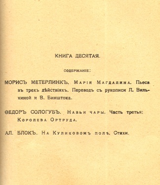 Перевод Л. Н. Вилькиной пьесы Мориса Метерлинка "Мария Магдалина" в альманахе "Шиповник", книга 10, 1909 г.